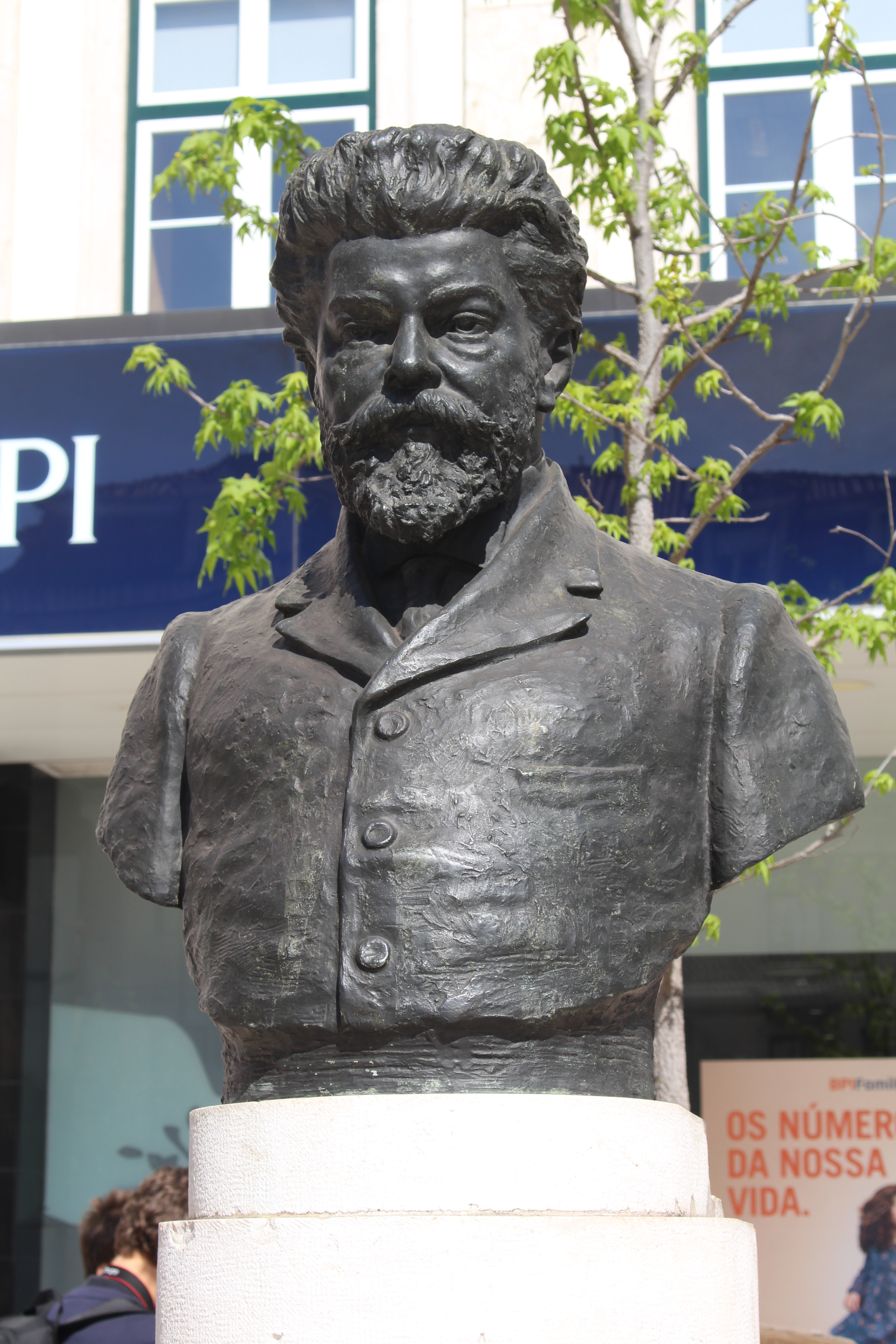 Buste de João Gonçalves Zarco da Câmara, Lisbonne.